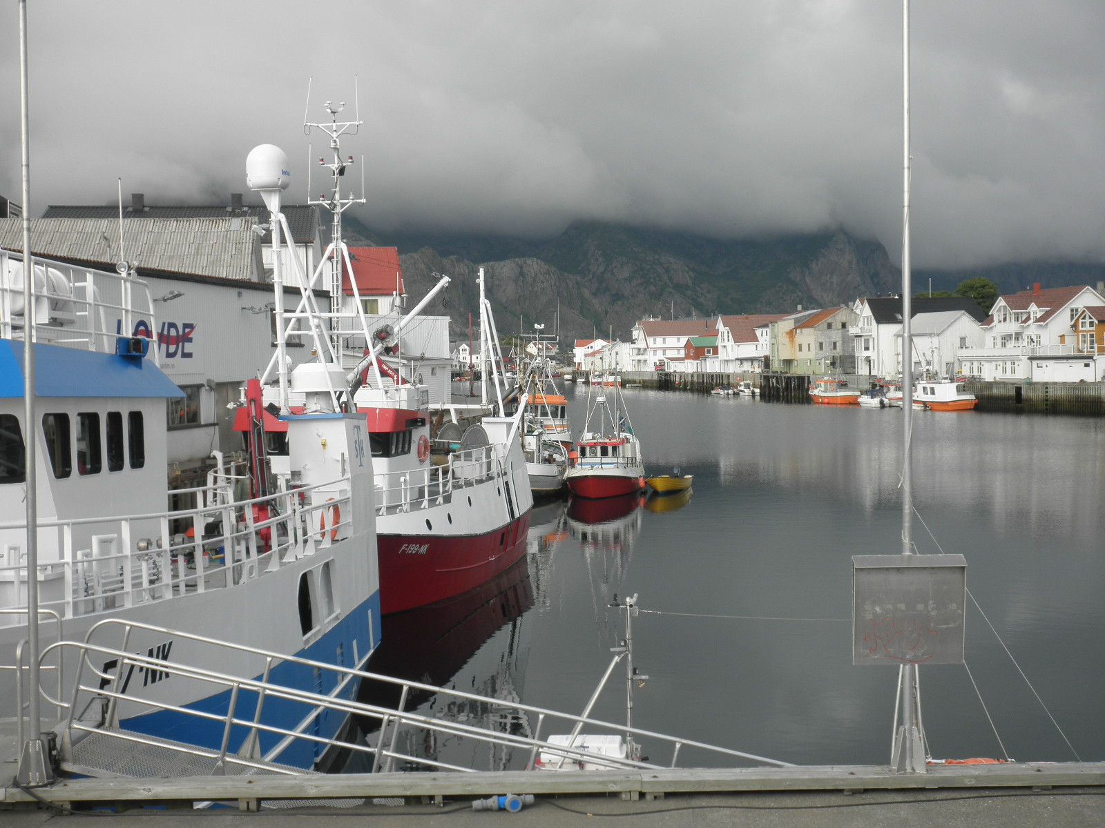 Henningsvær in Norwegen